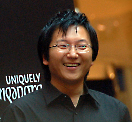 Masi Oka (Hiro Nakamura) - Extrait de "Parkman and Hiro Nakamura at Vivo City Singapore"